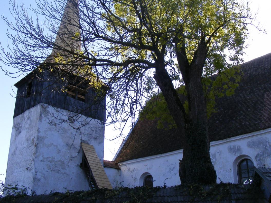 Nyárádszentlászlói unitárius templom